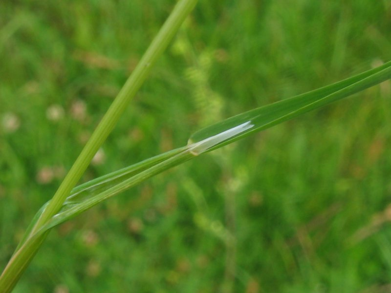 Wiesen-Rispengras (Poa pratensis), Gragetopshof